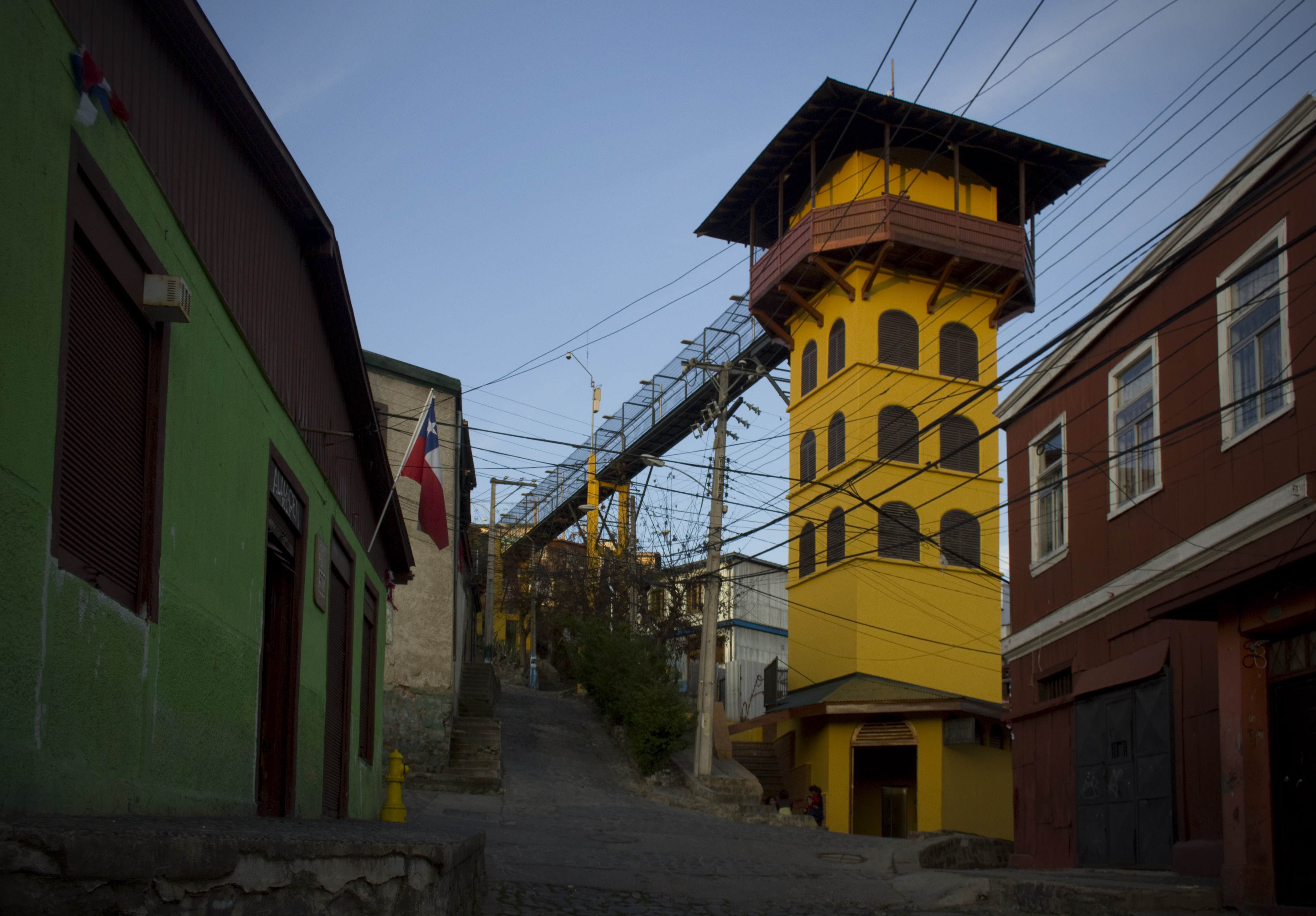 Acceso superior del Ascensor Polanco en el cerro del mismo nombre en Valparaíso, Chile. Visto desde la calle Simpson. Monumento nacional ID625 This is a photo of a national monument in Chile: 625